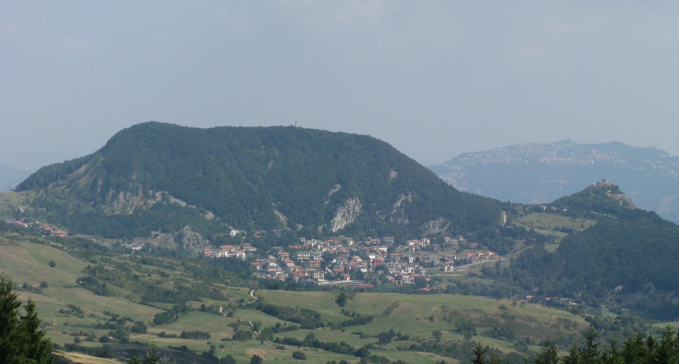 Panorama di Villagrande frazione di Montecopiolo.